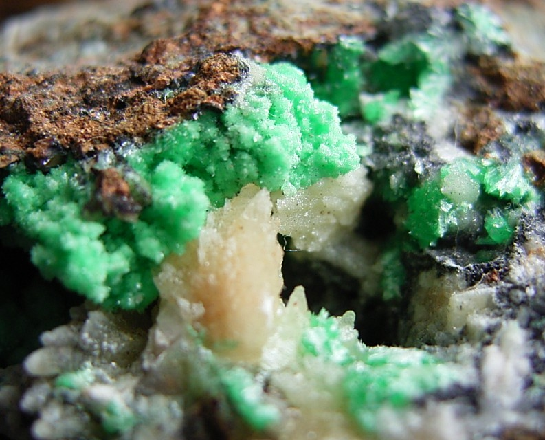 Annabergit_Laurion,Attika,Griechenland